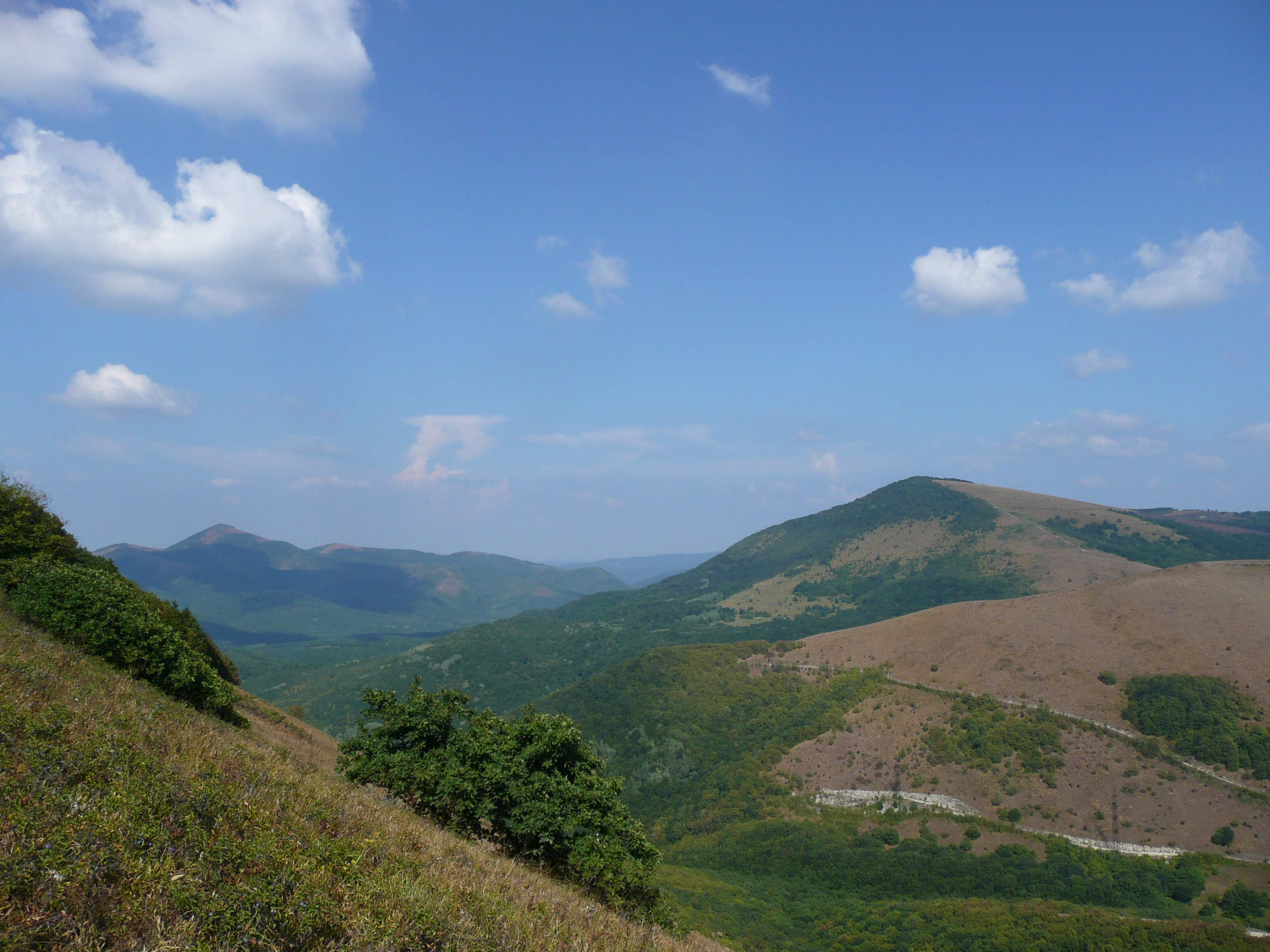 gorod Gelendzhik, Krasnodarskiy kray, Russia